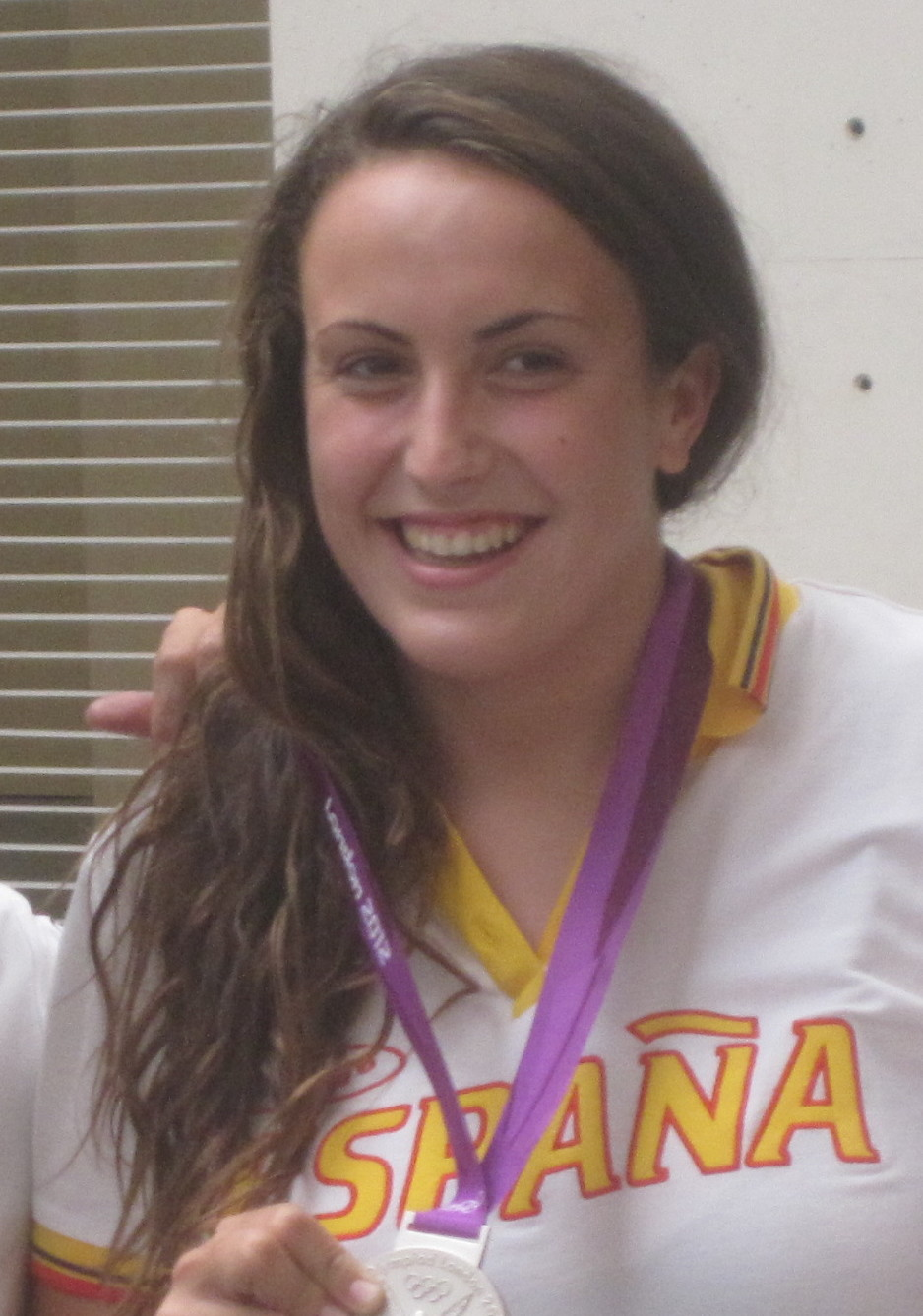 Andrea Blas con su medalla de plata ganada en los JJ.OO. de Londresm 2012.